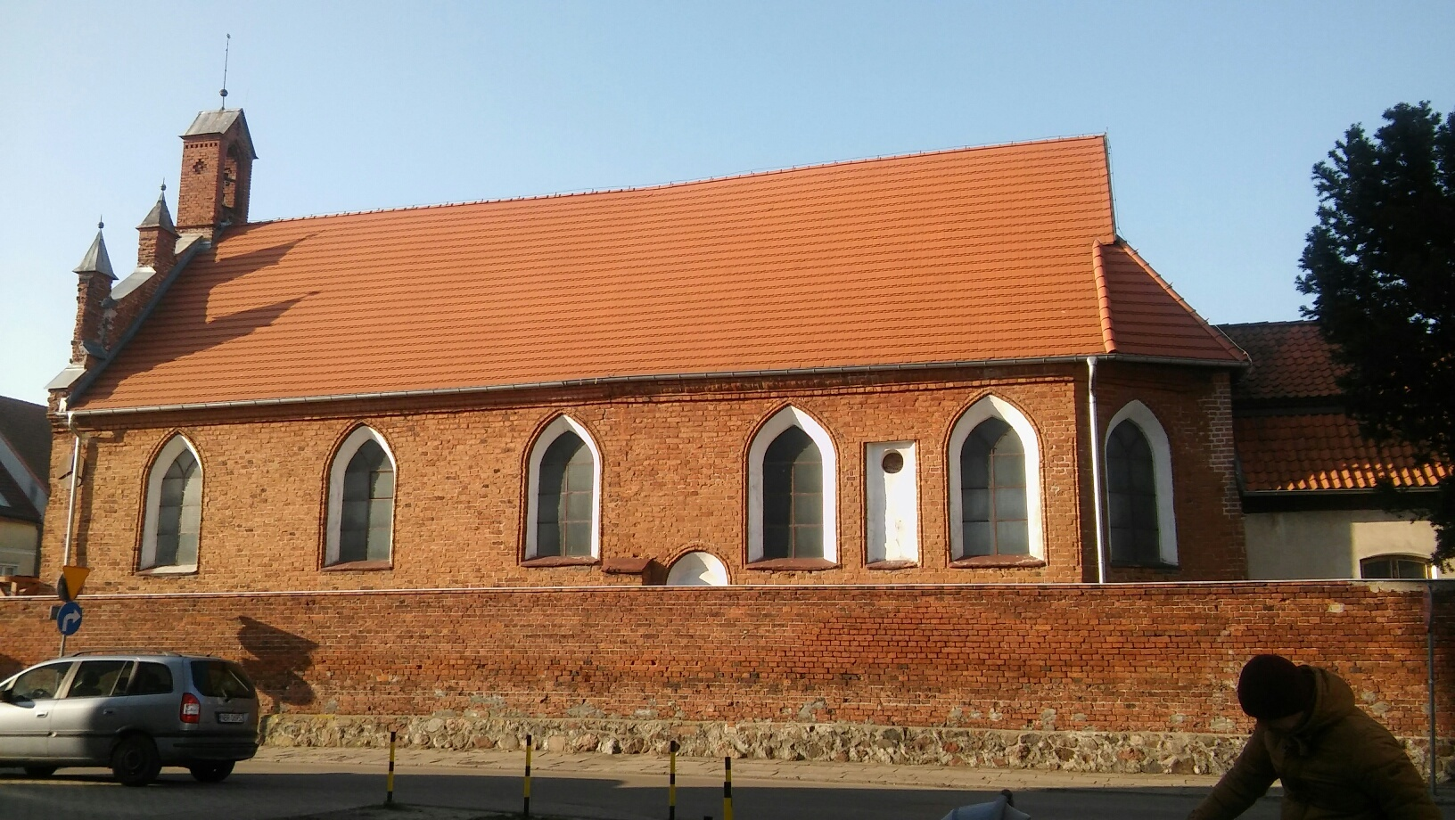 Braniewo, ul. Kościuszki 11 - kościół parafialny p.w. Świętej Trójcy, obecnie greckokatolicki, 1 poł. XV, 1583-1584, 1681, XVIII w.